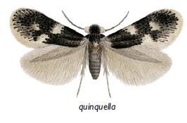 Ectoedemia quinquella male